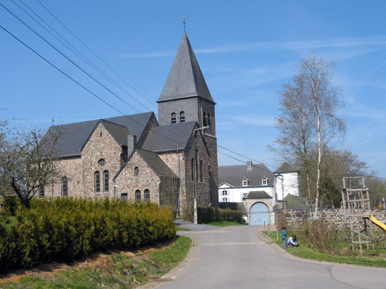 Roumont-sur-Ourthe (Belgique), l'église et le château Casaquy (1764).